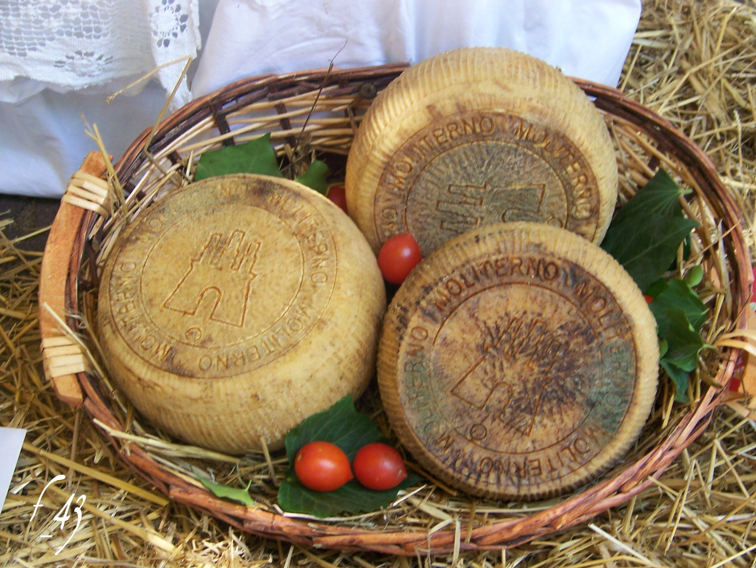 L'IGP Canestrato di Moliterno è prodotto, infine, nella regione Basilicata, in alcuni comuni della provincia di Potenza e Matera - Italia.